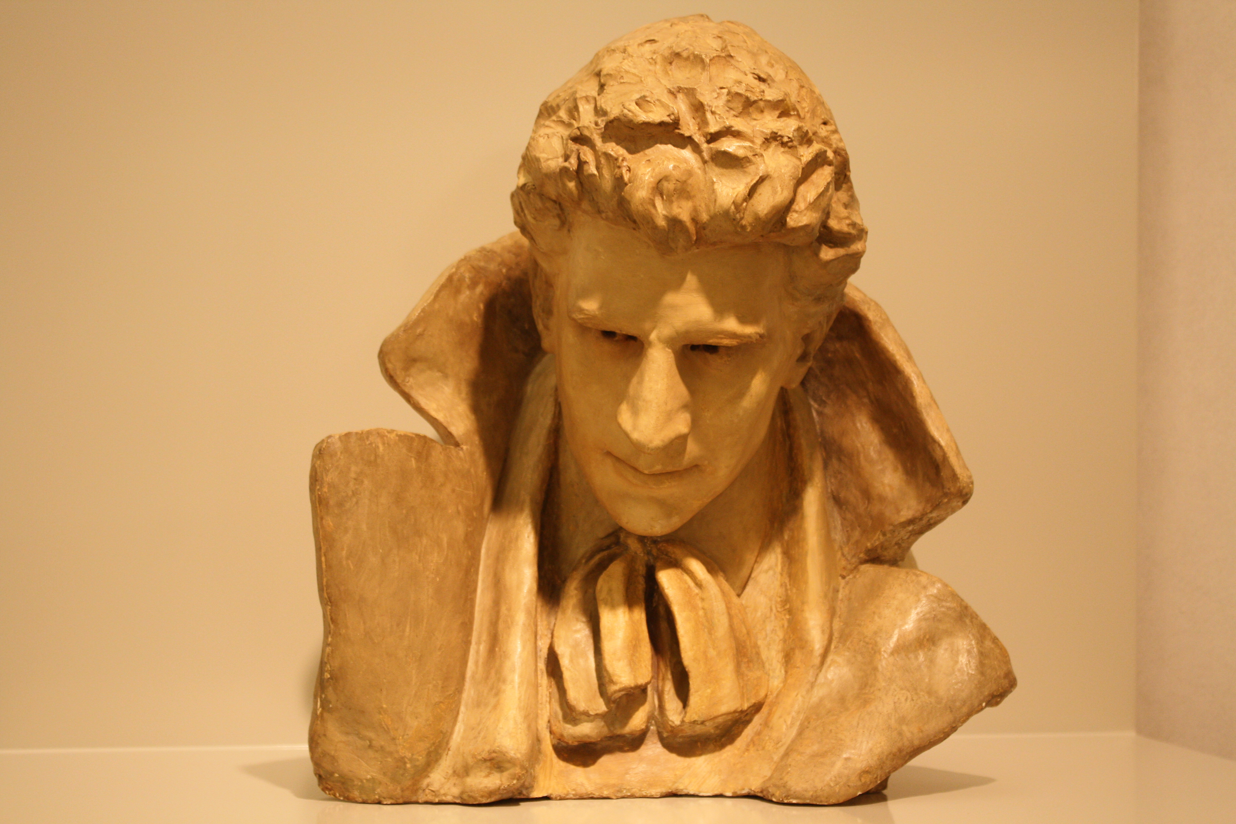 Busto de Enrique Campo Sobrino (1910), obra de Carmen Alcoverro López (1872-?), exposto no Museo de Pontevedra.